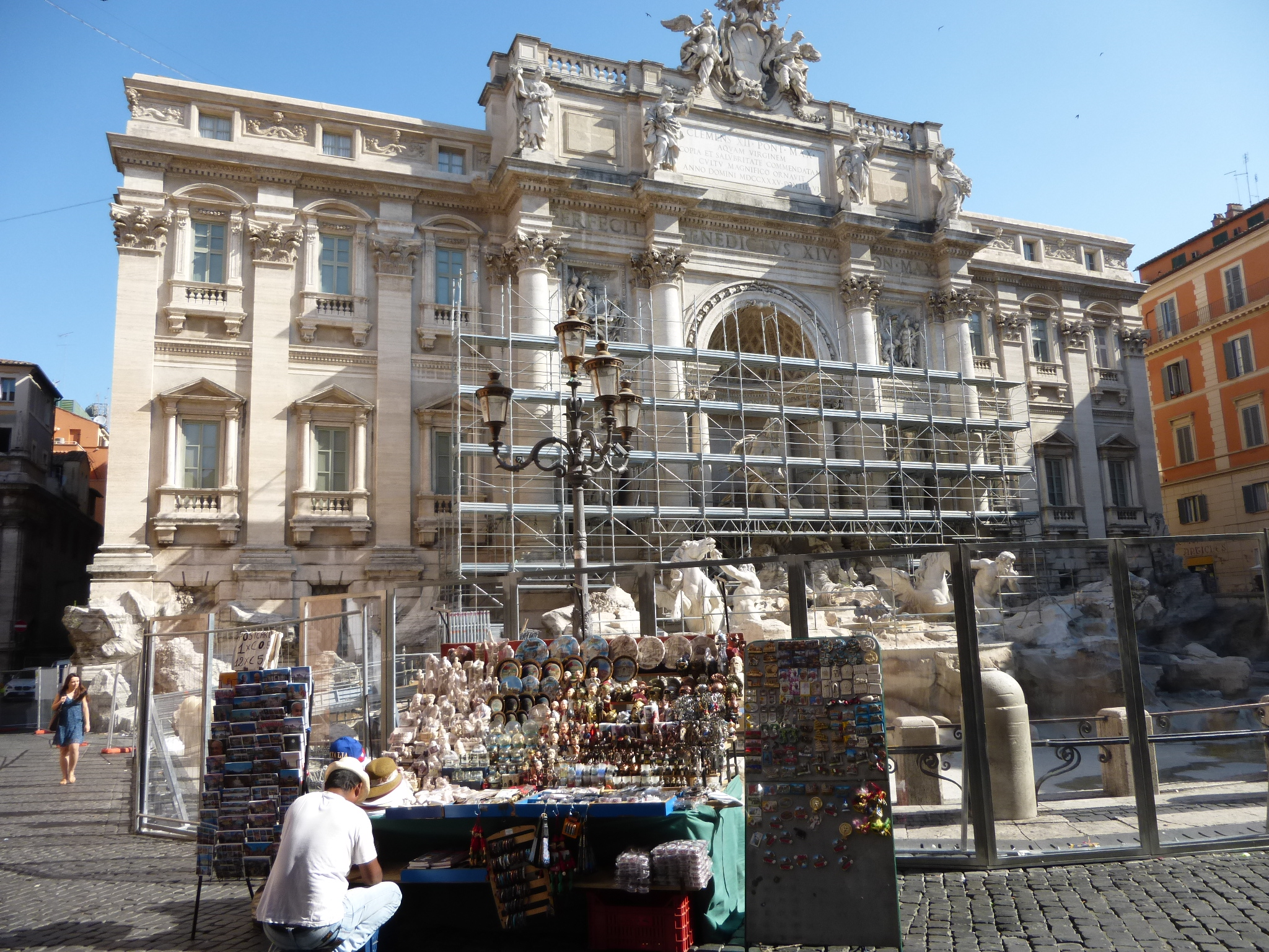 Roma, fontana di Trevi in restauro con bancarella in primo piano